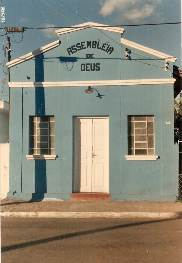 Antigo templo da Igreja Assembléia de Deus - Ministério de Madureira em Itirapina - SP.